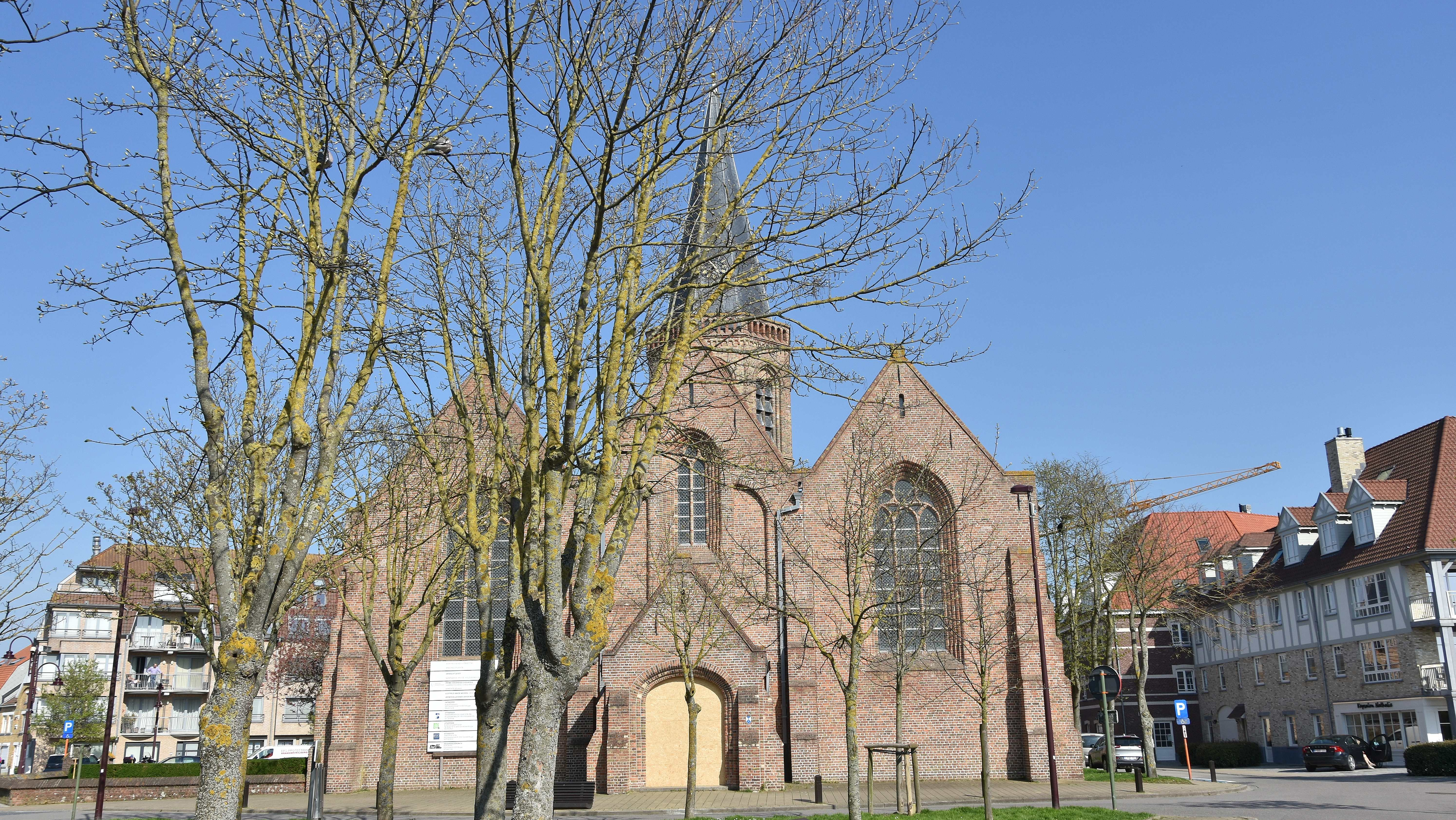 Heilige Kruisverheffingskerk Wenduine 19-04-2018 16-51-10 This photo of immovable heritage has been taken in the Flemish Region